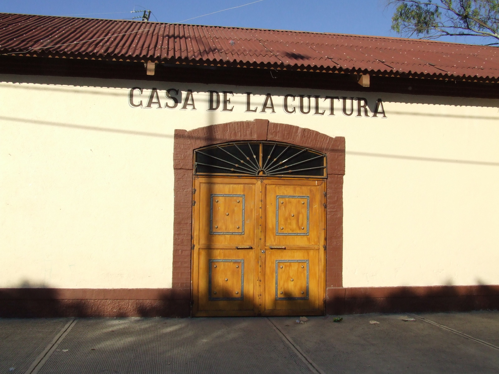 Casa de la Cultura de Buenavista de Cuéllar en la antigua estación del ferrocarril.